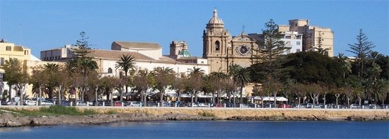 Panorama di Mazara del Vallo